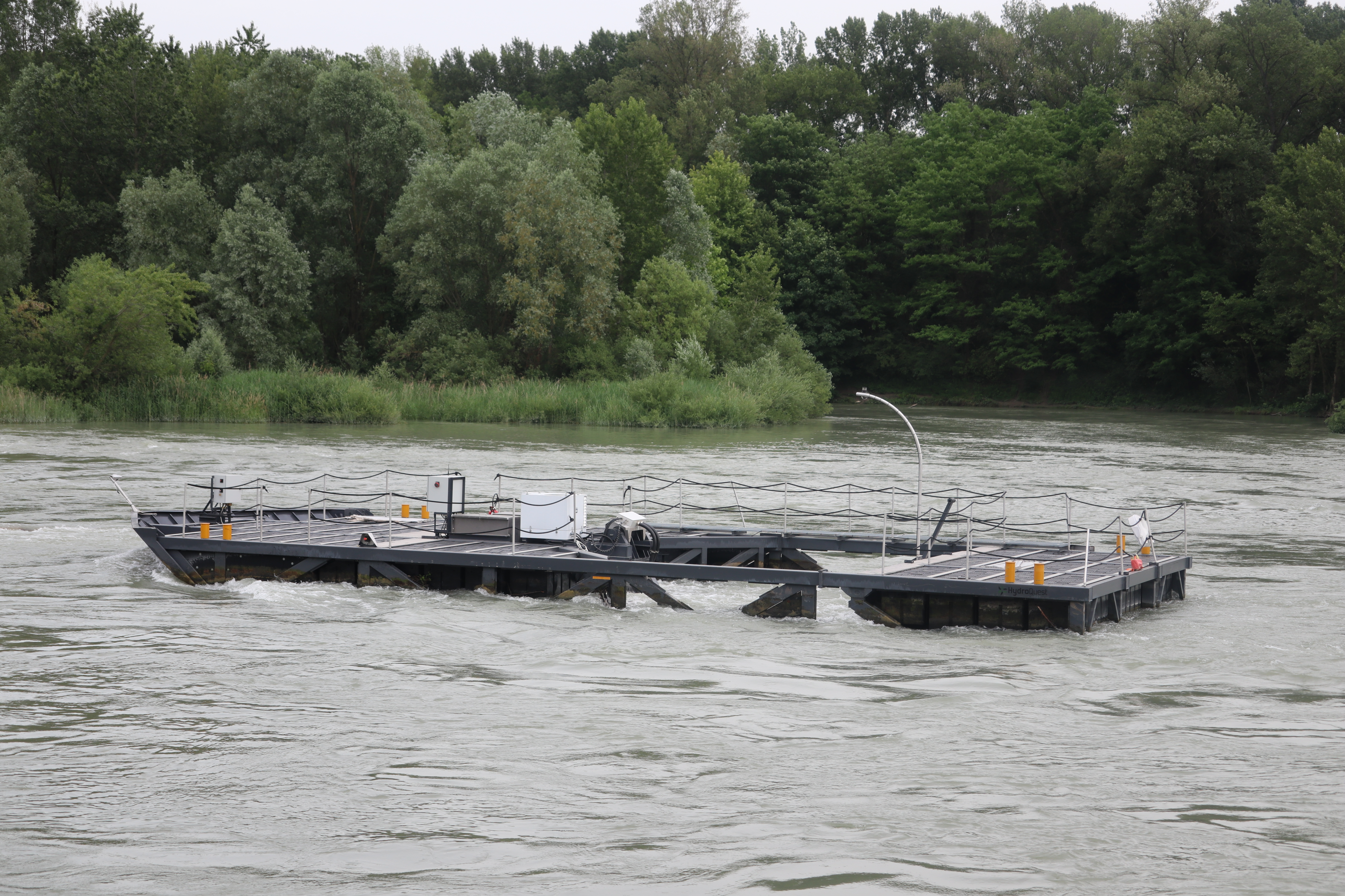 Hydrolienne de la ferme hydrolienne de la centrale de Caluire-et-Cuire sur le Rhône.